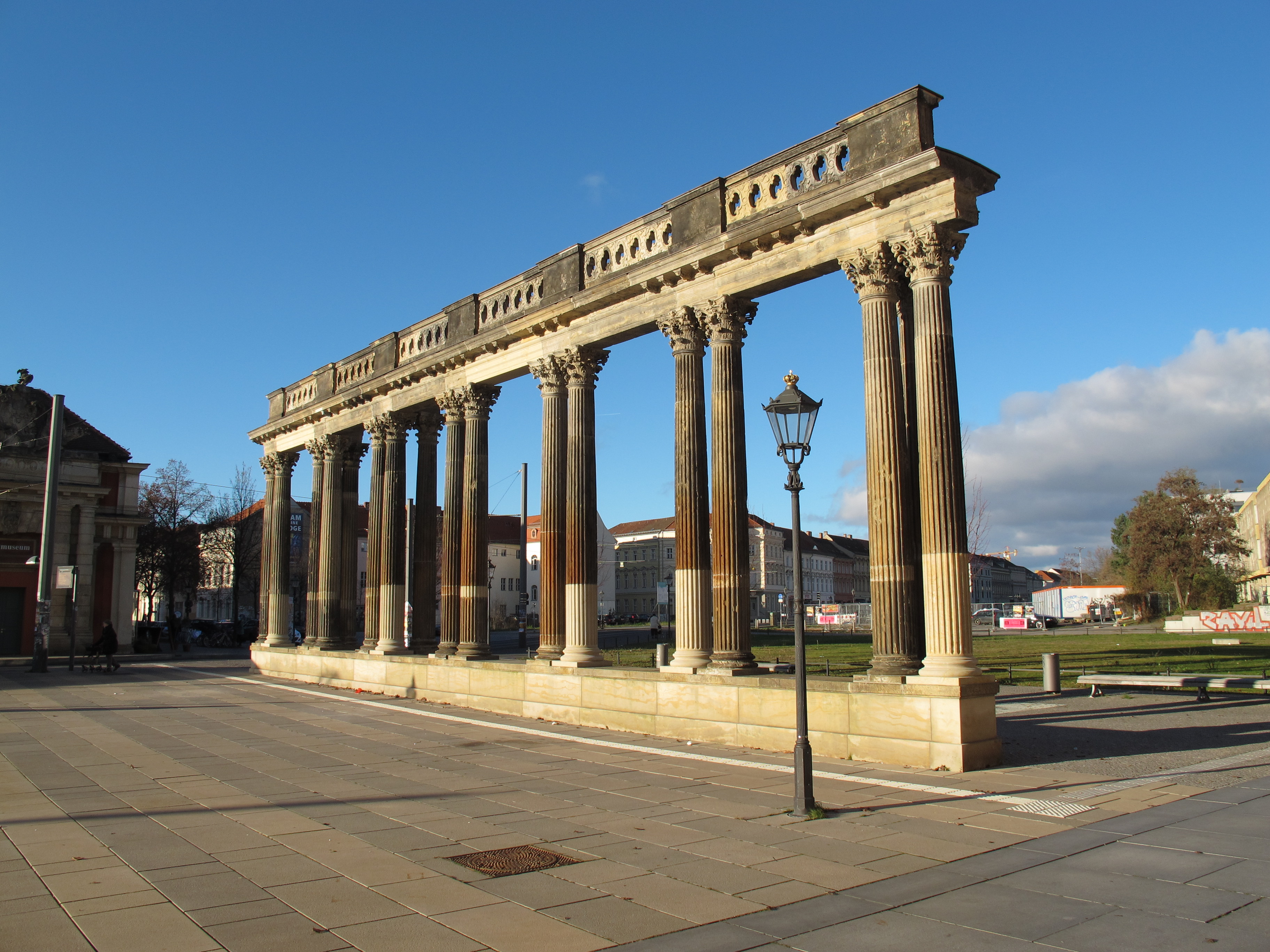 Reste der Ringerkolonnade auf der Westseite vom Stadtschloss Potsdam, ohne Skulpturen.